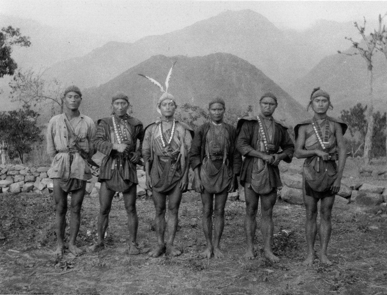 鳥居龍藏所攝鄒族獵人